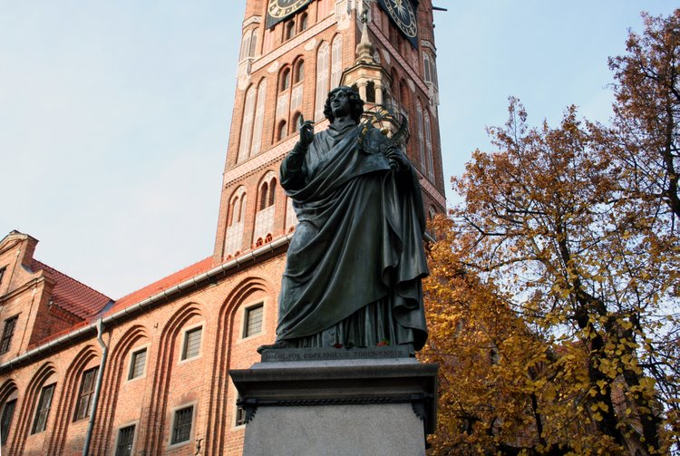 Kopernik monument in Torun